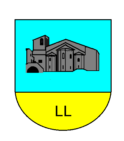 Escut municipal antic de Llimiana (Pallars Jussà)